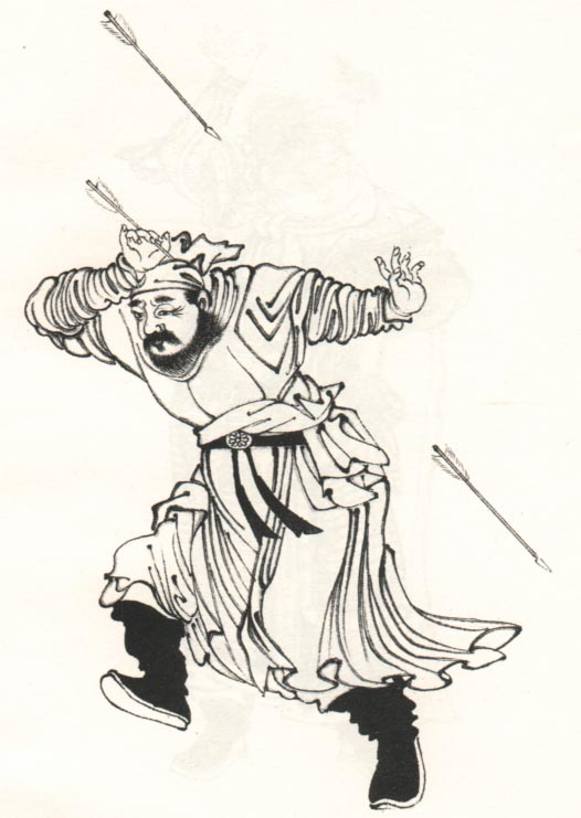 赵德胜，明朝军事将领